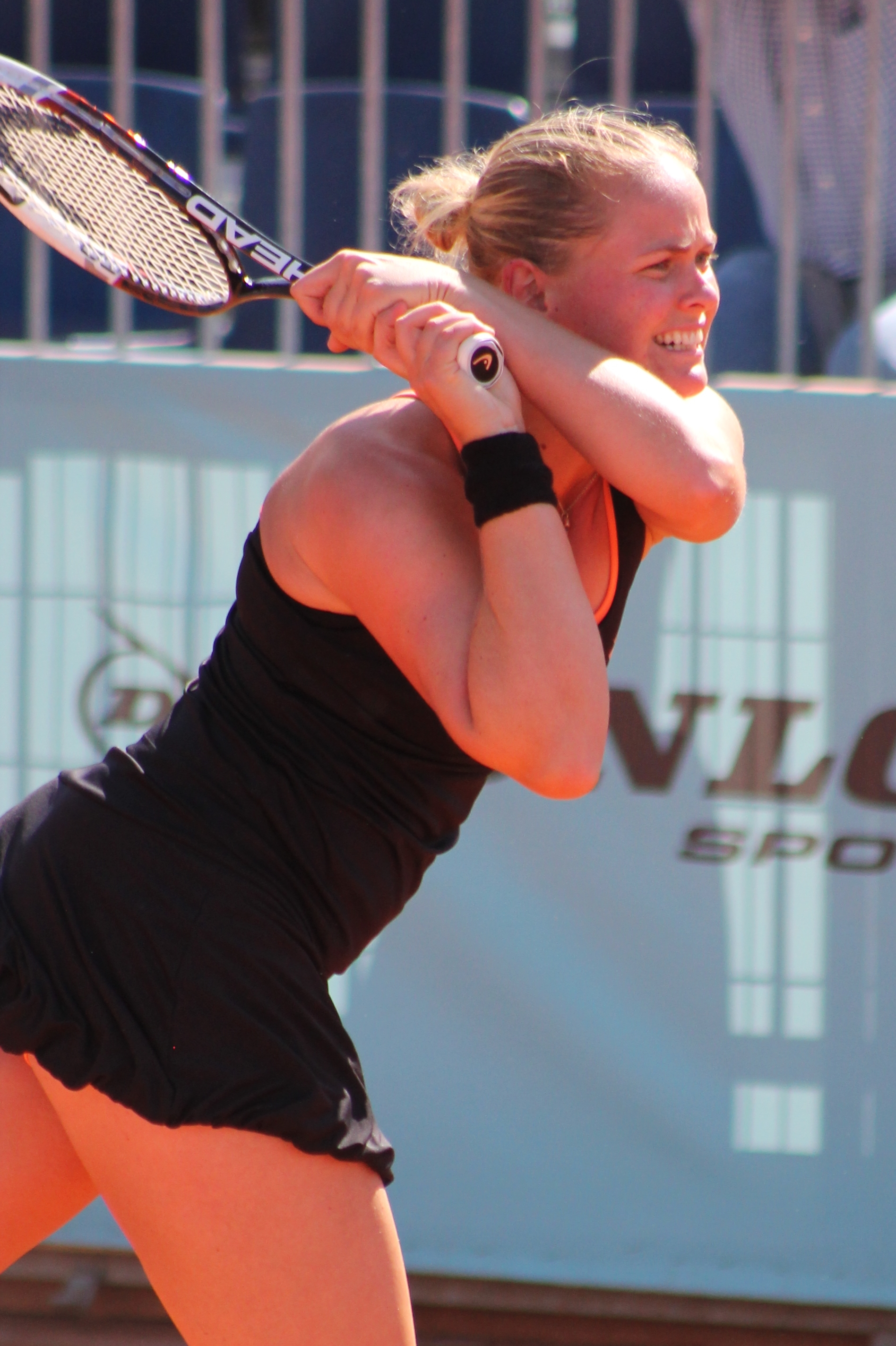 Groenefeld MA14 (7)